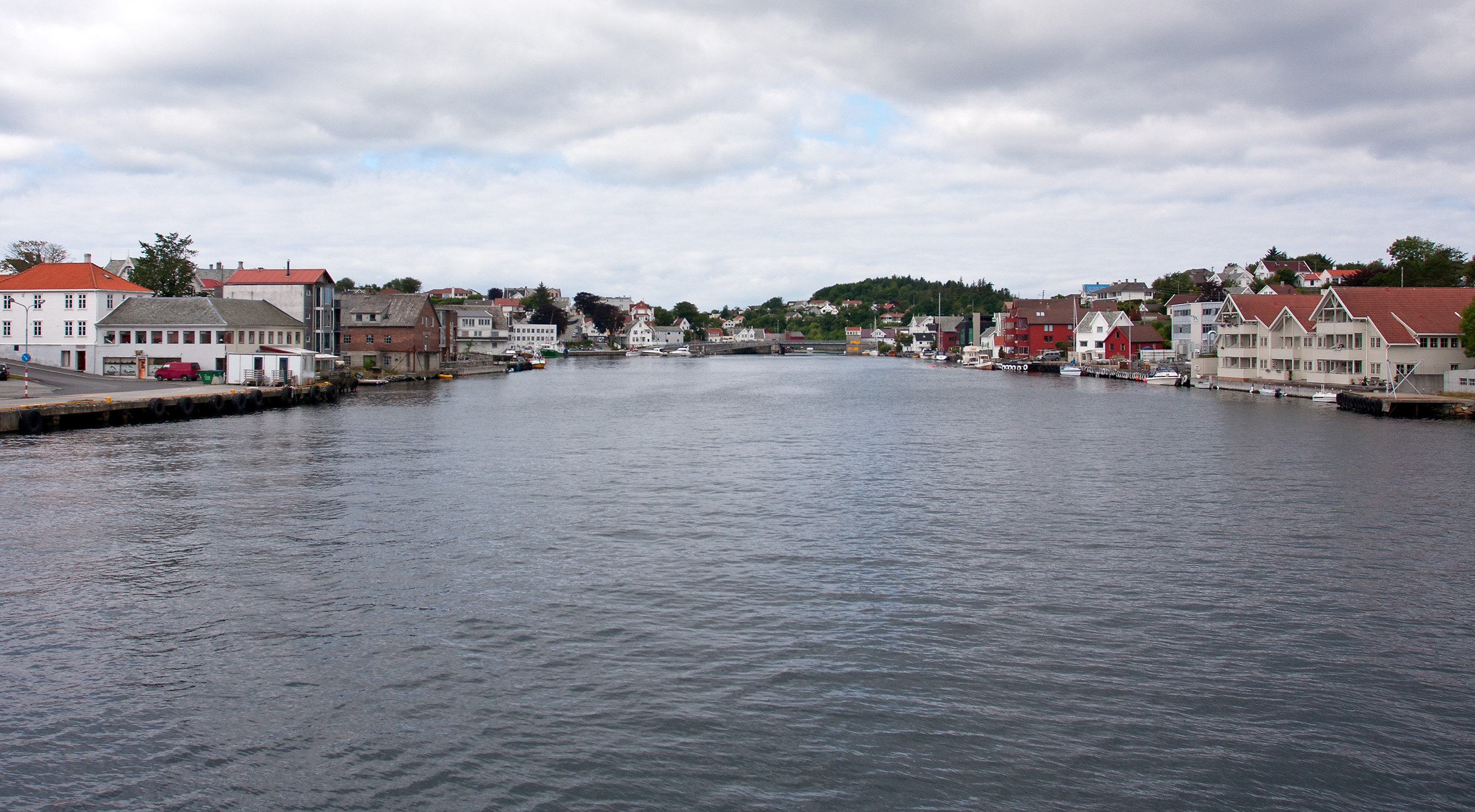 Kopervik, Norway